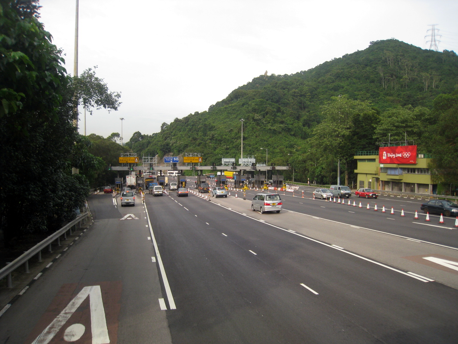 Lion Rock Tunnel Toll Plaza 獅子山隧道